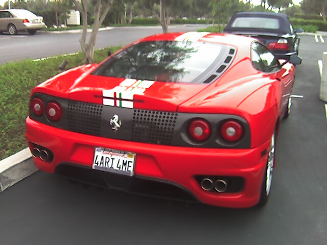 F360 Challenge Stradale.